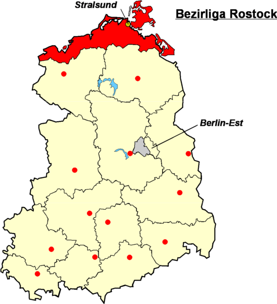 Localisation de Stralsund dans la Bezirksliga Rostock Catégorie:Logo de clubs de football - Allemagne